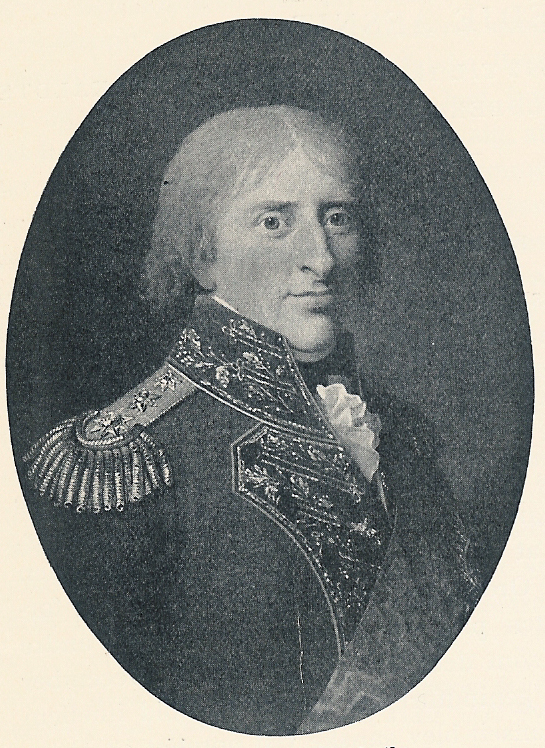 Arveprins Frederik. 1753-1805.